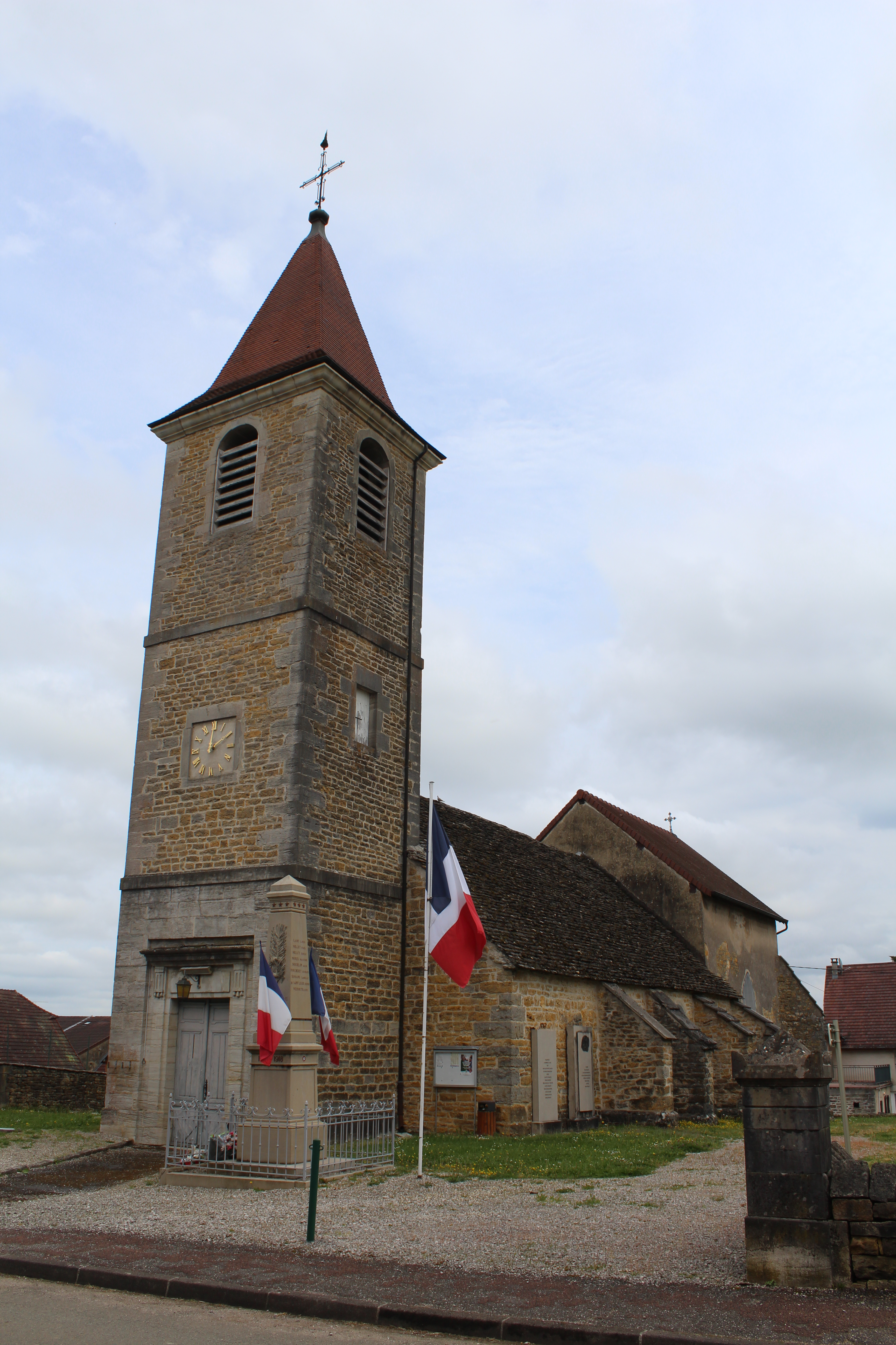 Église Saint-Rémy de Plainoiseau.